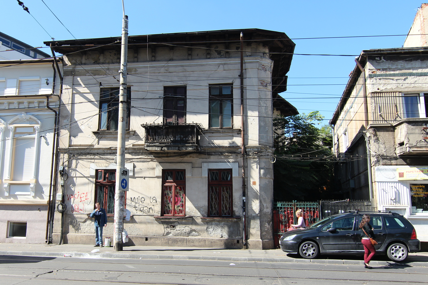 Casă pe strada Traian